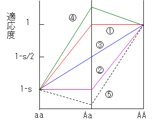 集団遺伝学における適応度。①Aはaに対して優性 ②Aはaに対して劣性 ③半優性 ④超優性 ⑤負の超優性